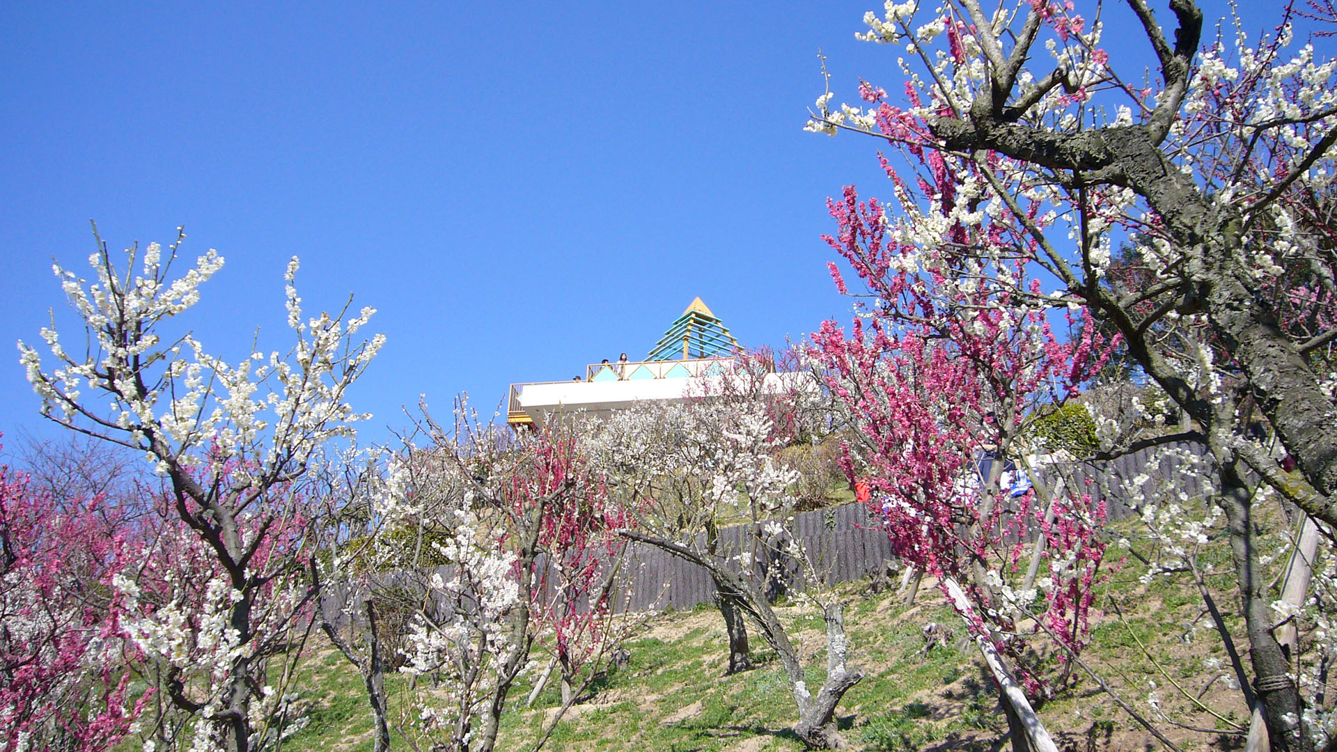 Sumaura Sanjo Amusement Park in Kobe, Japan